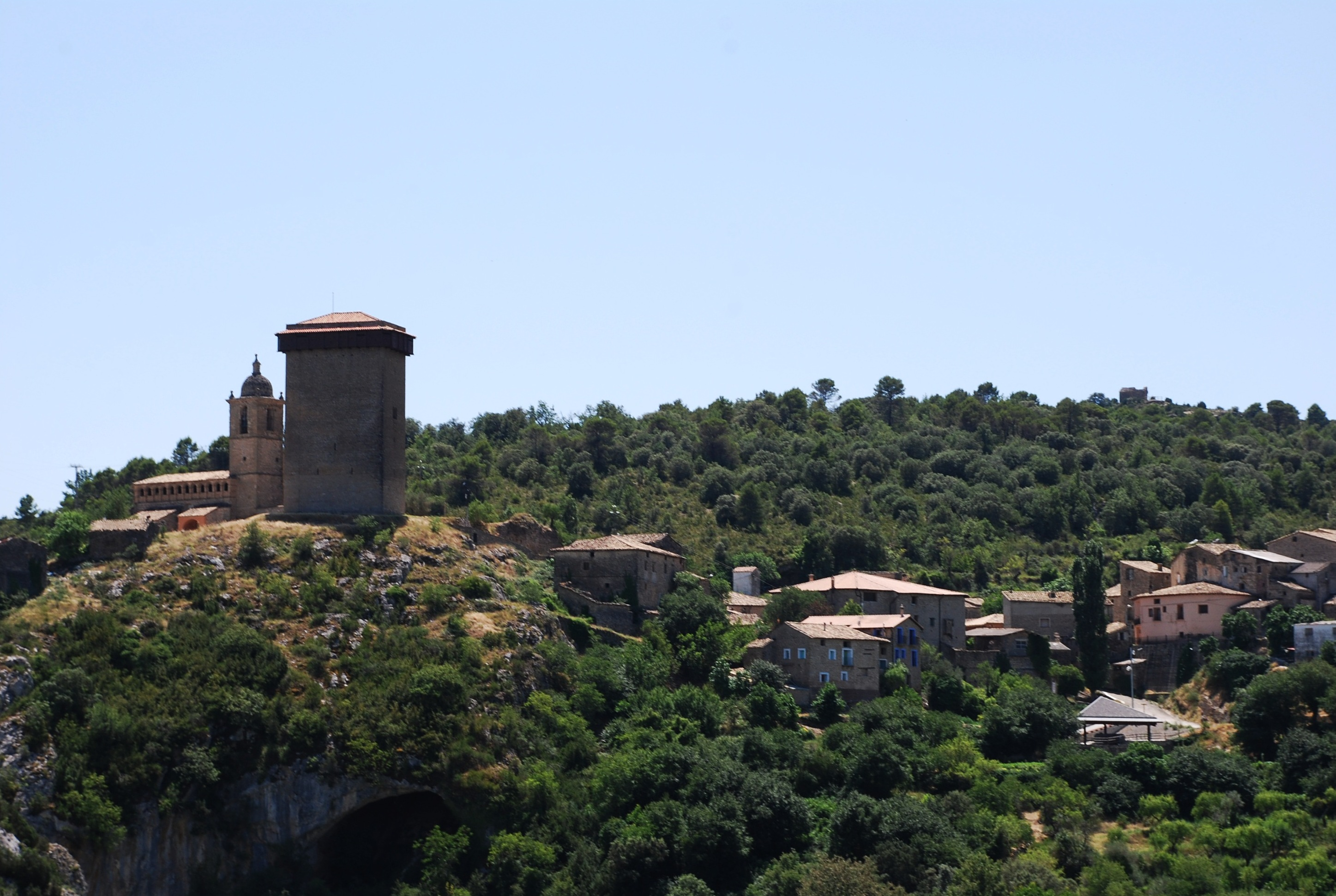 Abizanda, provincia de Huesca (España)